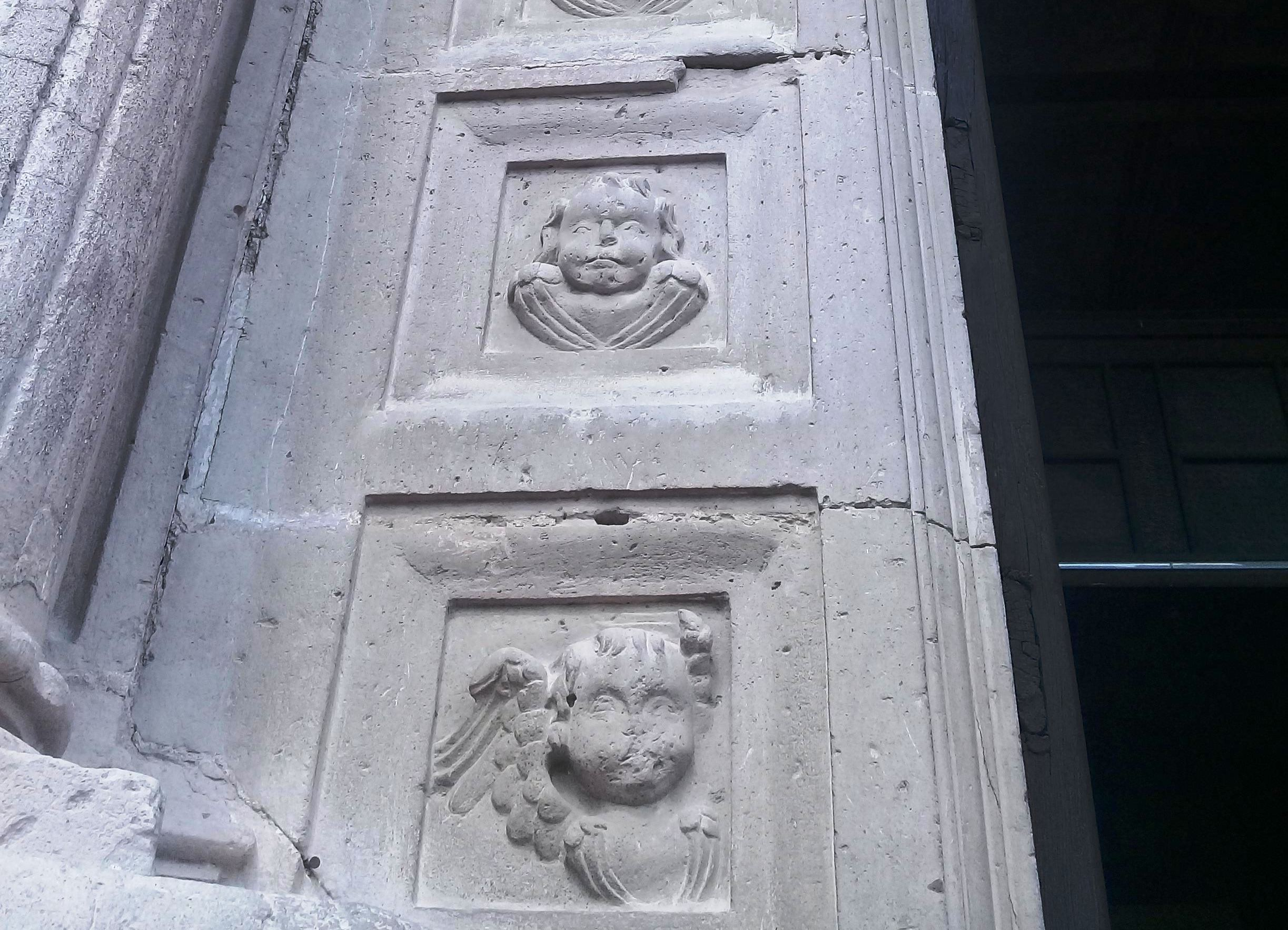 Templo y exconvento de San Nicolás de Tolentino (Actopan).